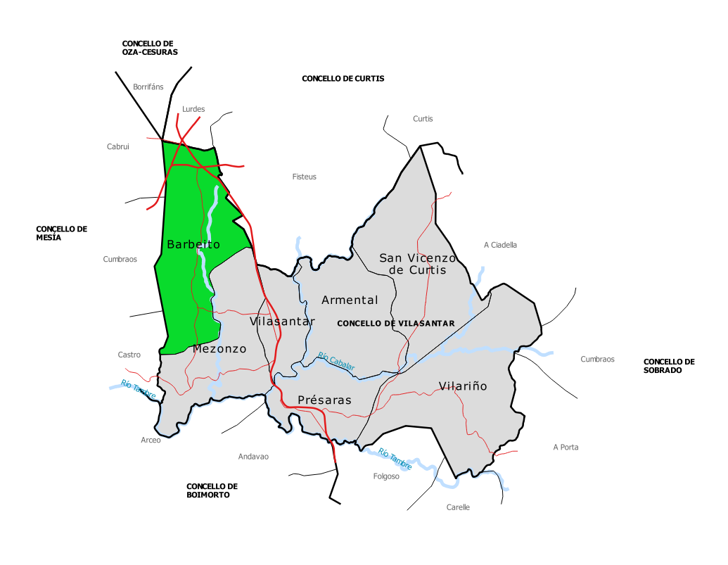 Mapa da parroquia de Barbeito no concello de Vilasantar (Galiza).